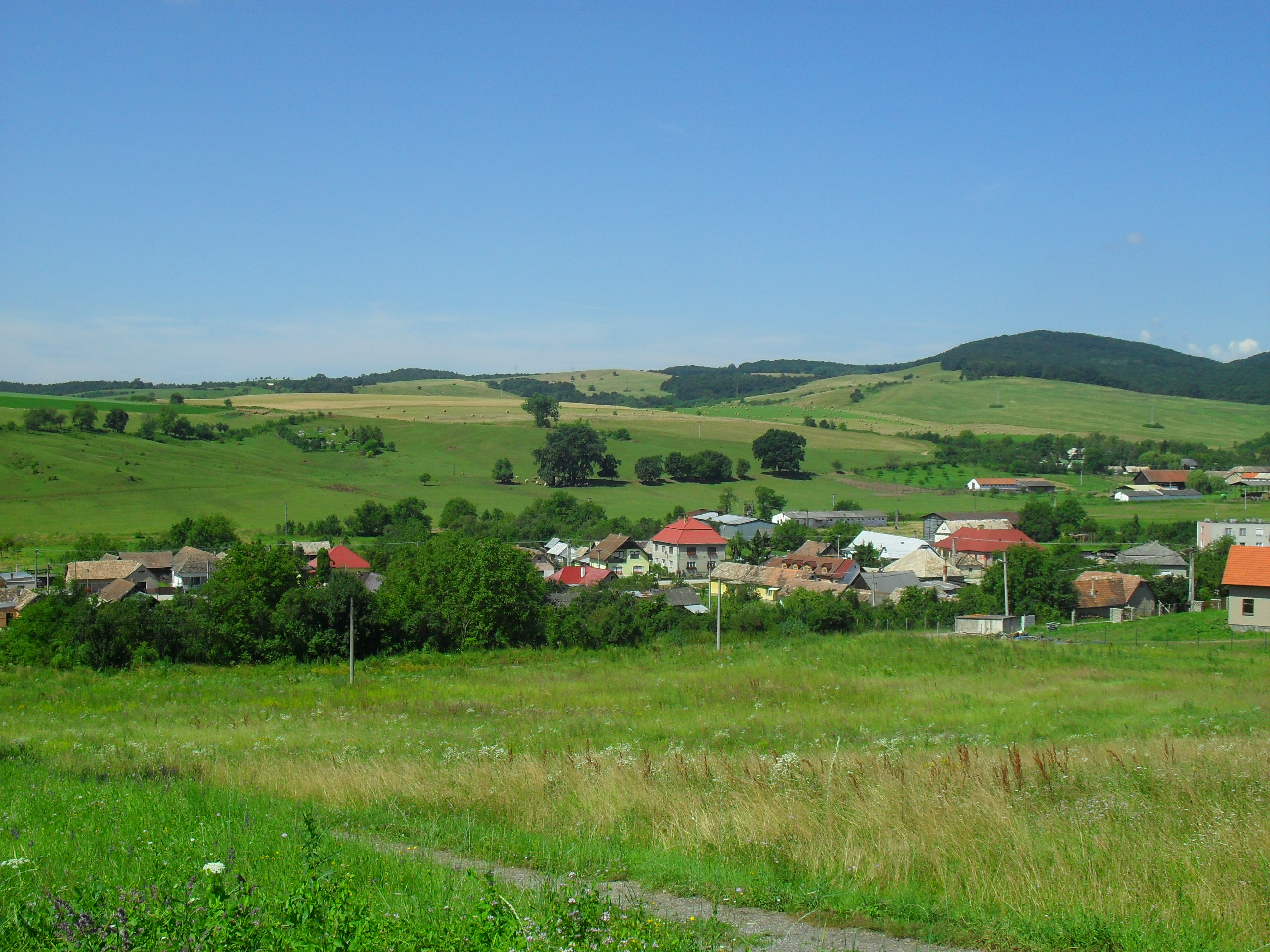 Alsóvály - a falu látképe a temetődombról